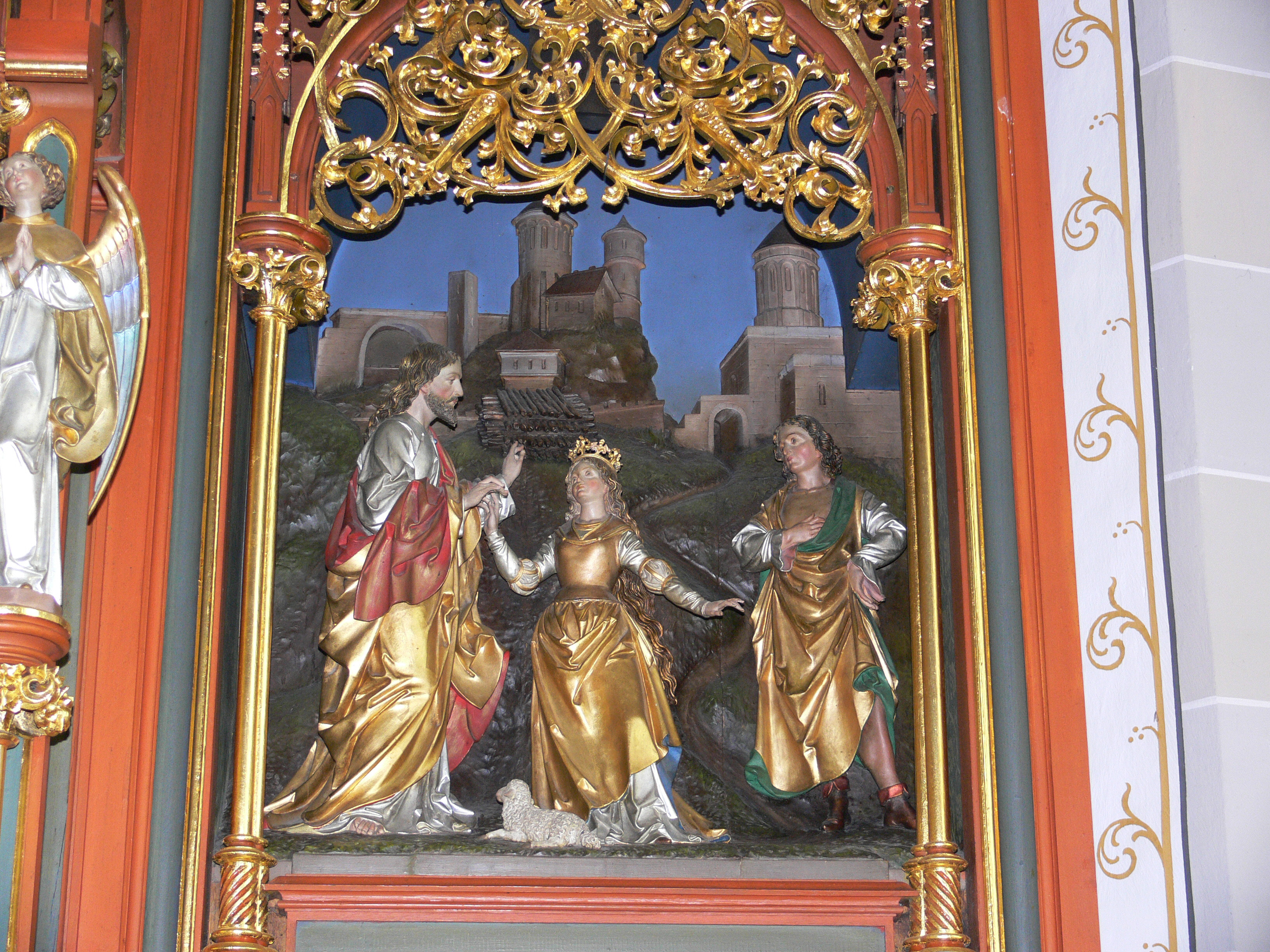 Limpach, Gemeinde Deggenhausertal: Pfarrkirche St. Georg, Hochaltar von Theodor Schnell d. J, um 1900: Rechte Nische: Hingabe der Hl. Agnes an Jesus unter Verzicht aller weltlichen Verlockung